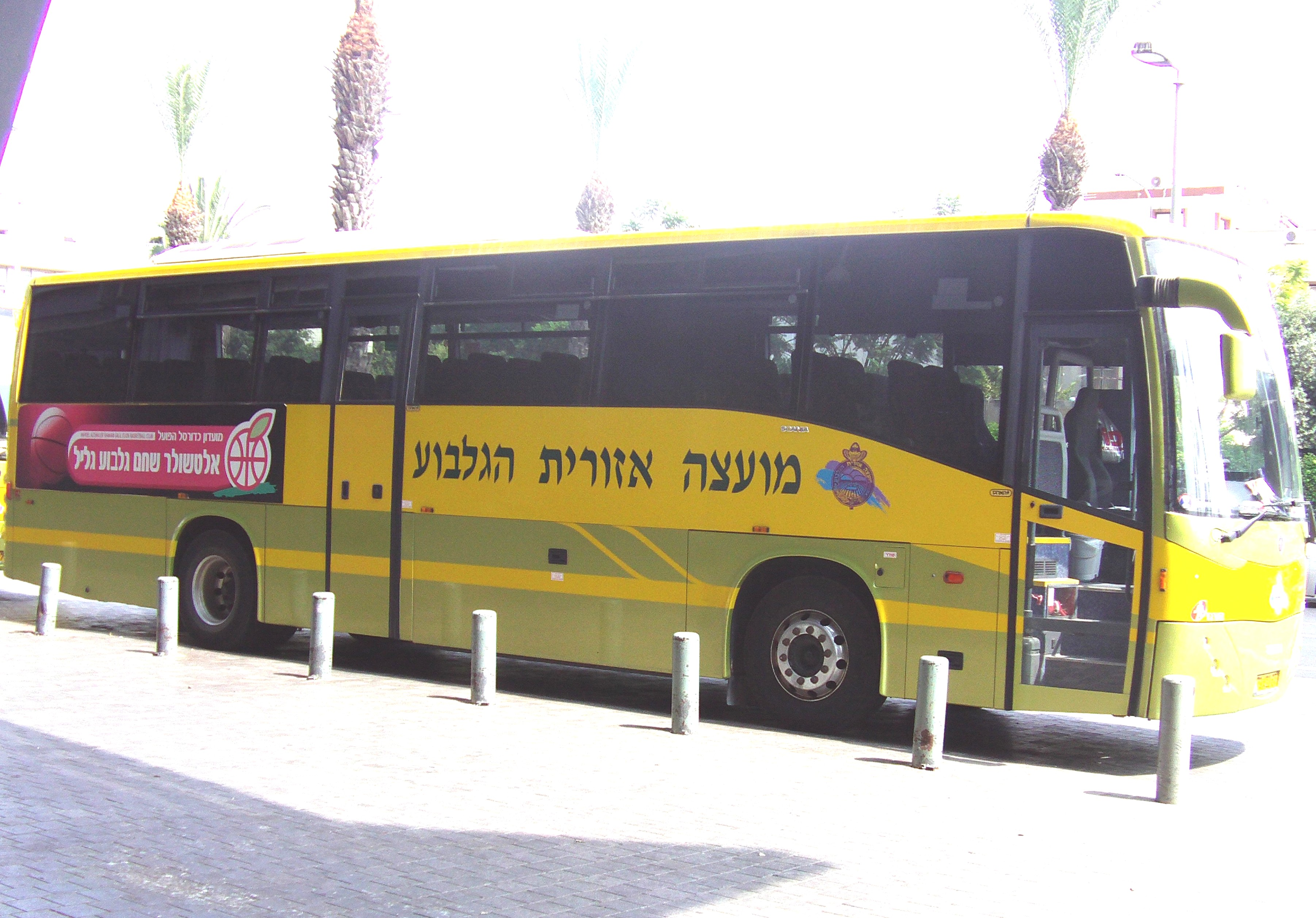 sdot negev הגילבוע